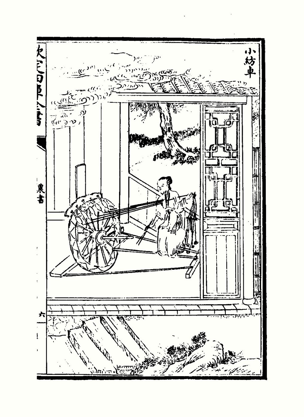 农书小纺车